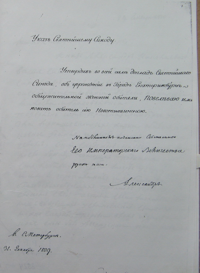 Указ Александра Первого Святейшему Синоду об учреждении Ново-Тихвинского женского монастыря в Екатеринбурге 31 декабря 1809 года